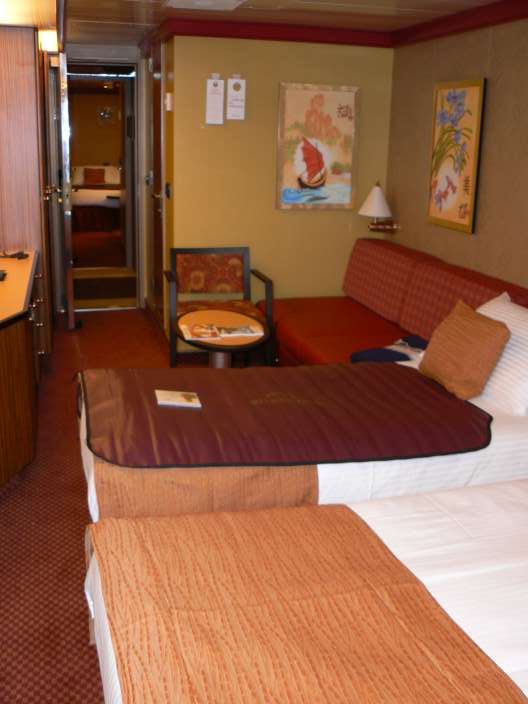 La suite 1020 du Carnival splendor